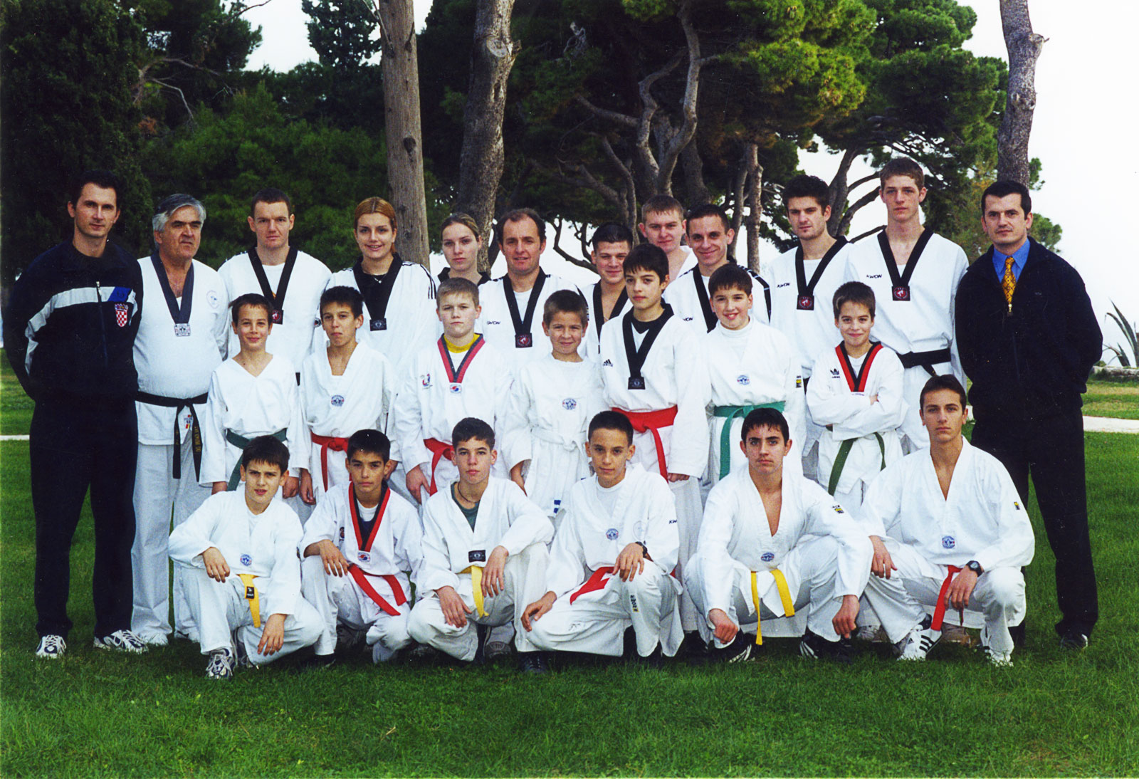 TKD Klub Kocunar i predsjednik kluba Dragan Primorac - TKD Club Kocunar and president of the club Dragan Primorac